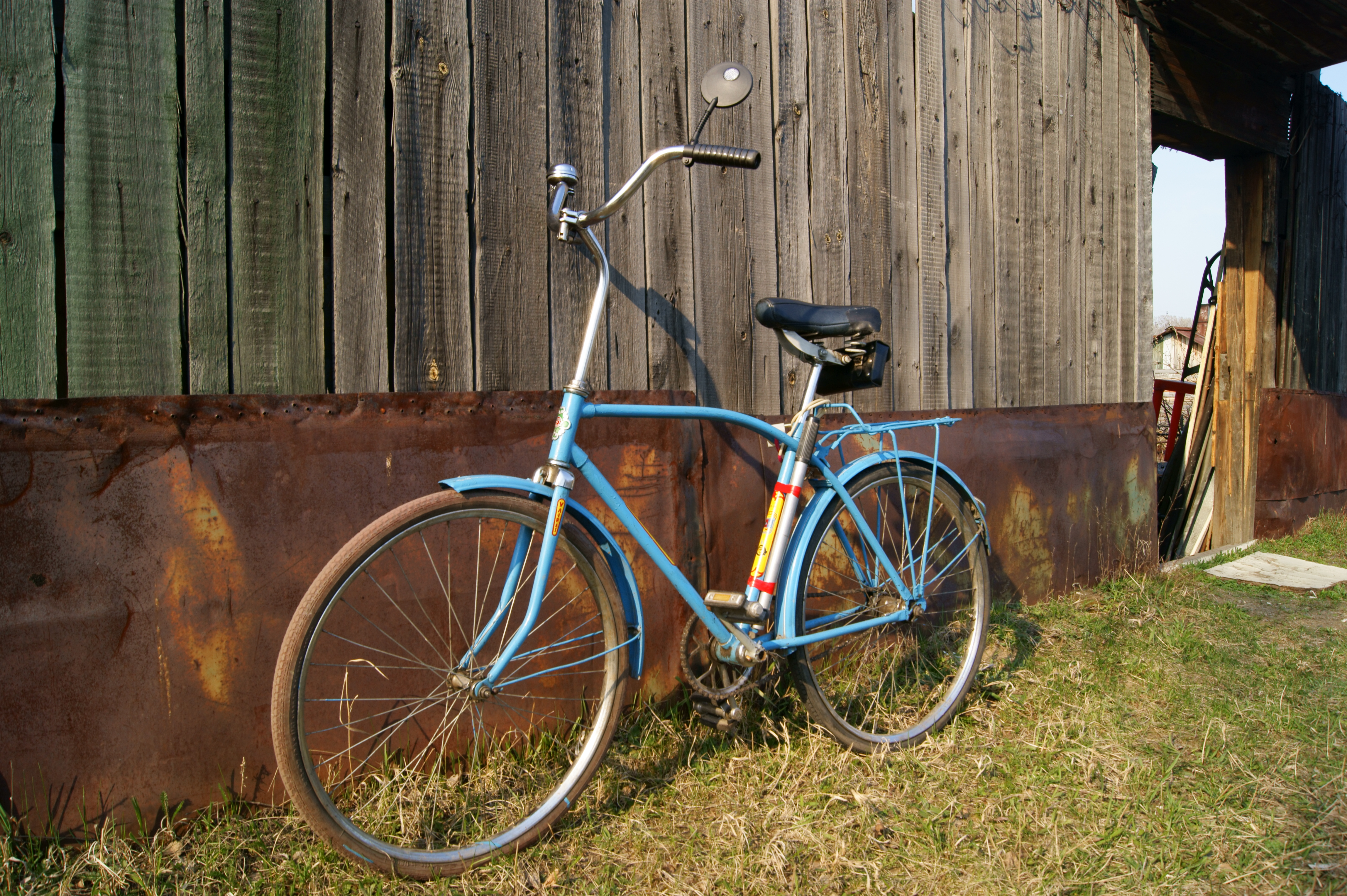 Велосипед «Орлёнок»